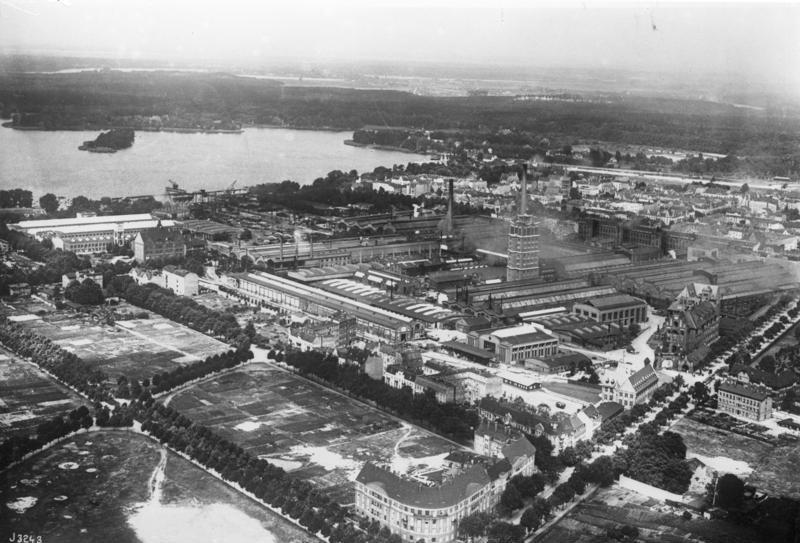 Die weltbekannten Borsigwerke insolvent! und haben ihre Zahlungen einstellen müssen. Aus kleinsten Anfängen heraus hat sich die bekannte Maschinenfabrik zur Weltfirma empor gearbeitet und über 90 Jahre erfolgreich geschaffen. Bekannt war der Borsig-Lokomotivbau. Gesamtansicht der heutigen Borsigwerke in Tegel/Berlin.